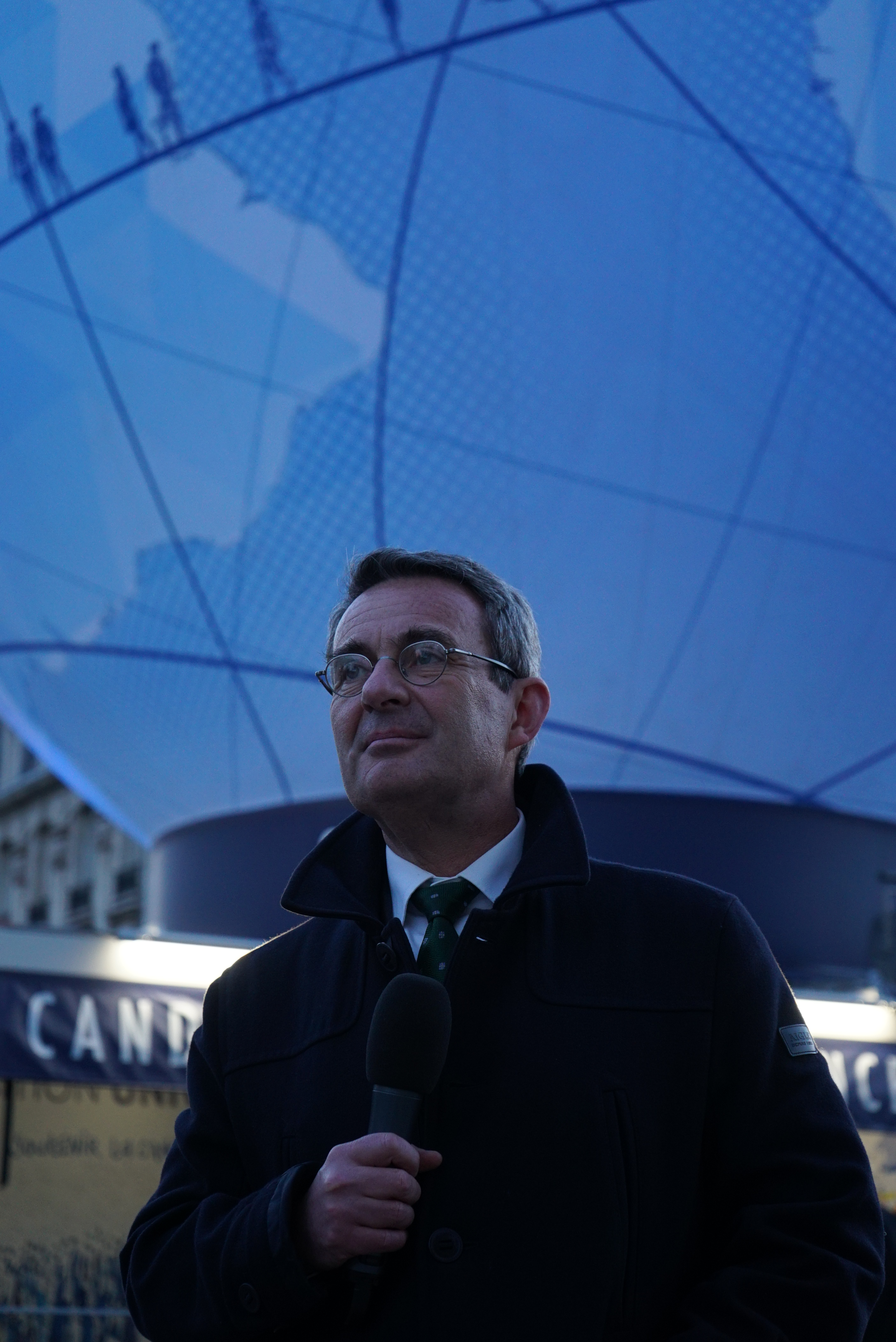 lors de Expo France 2025 à Reims.